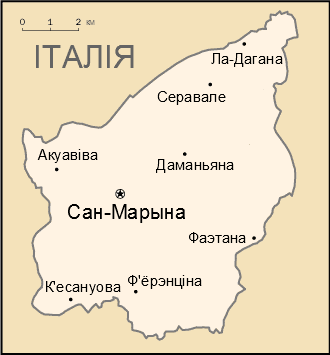 Карта Сан-Марына